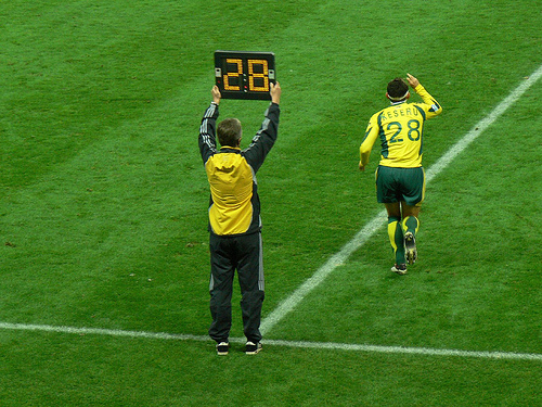 Claudiu Keserü: FC Nantes / AS Saint-Etienne